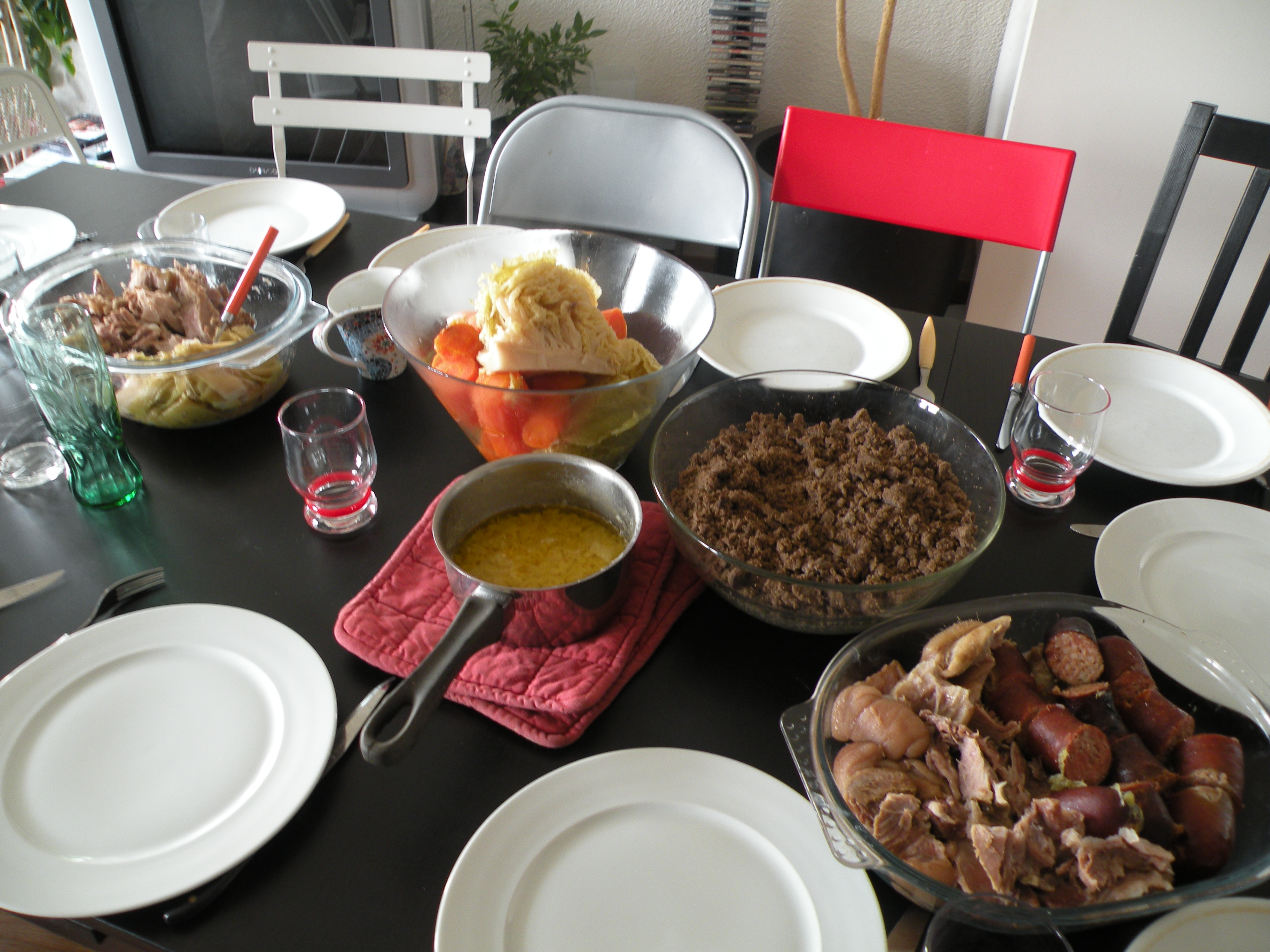 Kig ha farz préparé à Rennes en janvier 2012.